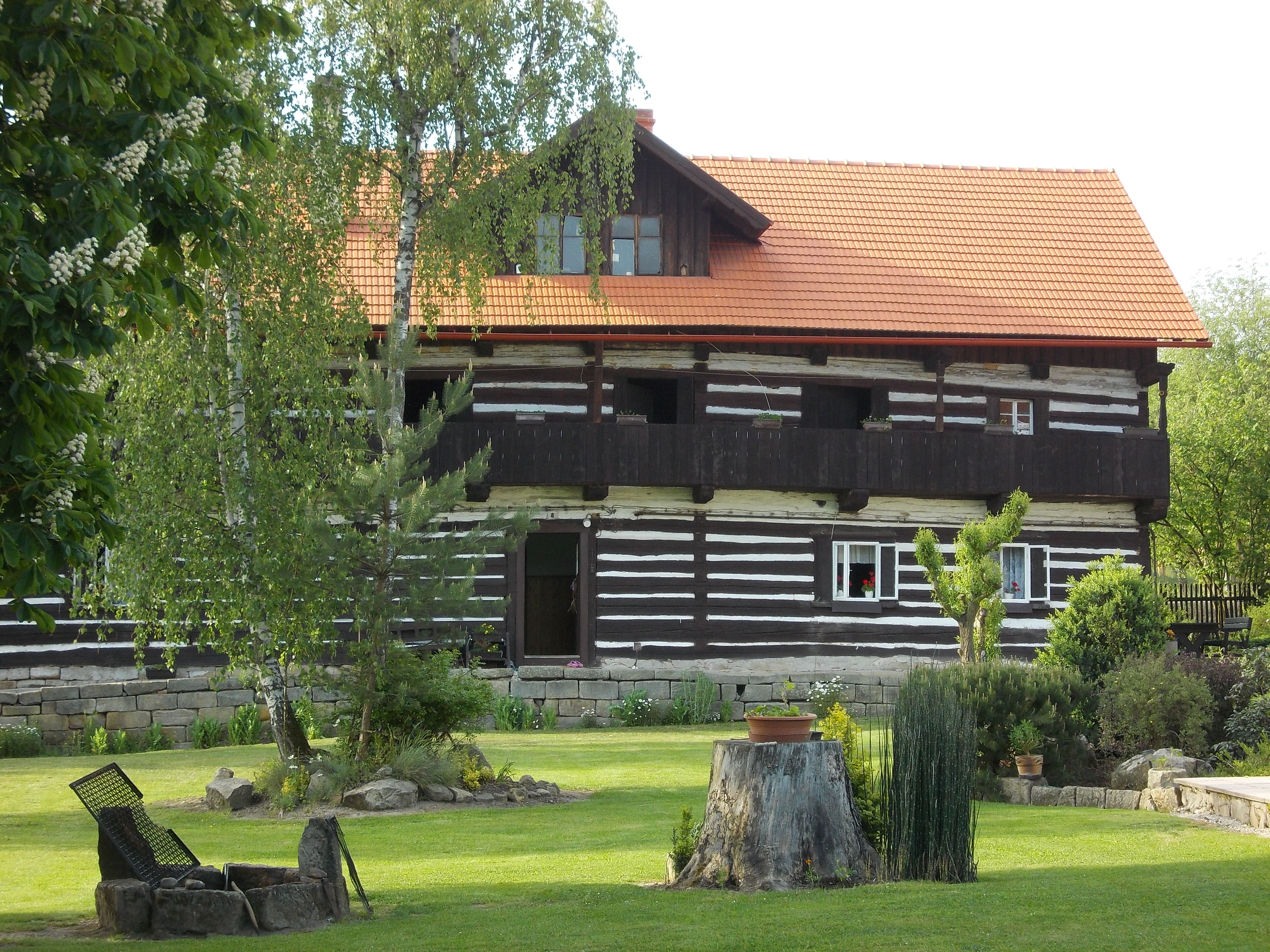 Zámostí - dům č.p. 8